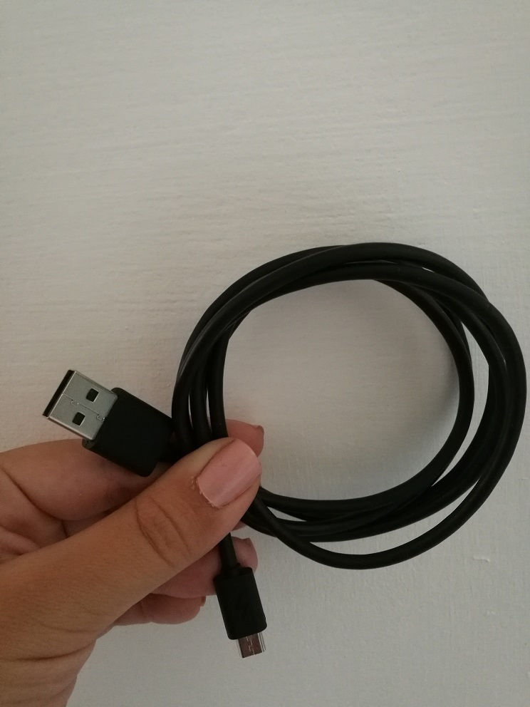 כבל USB